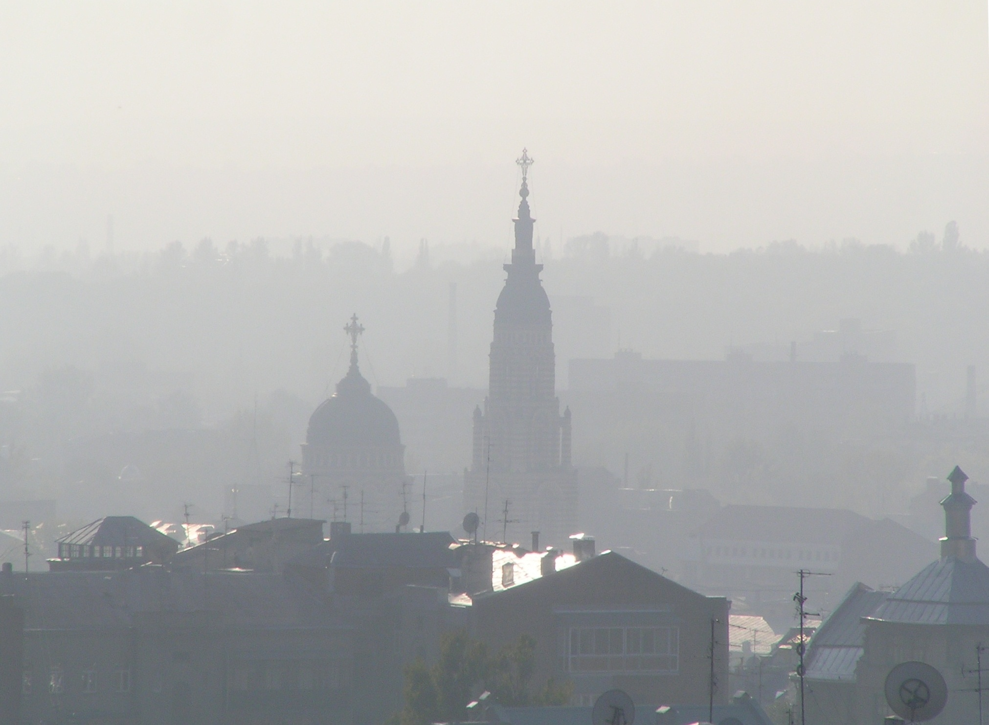 Благовіщенський собор 1901р., вул. Енгельса,12, м.Харків